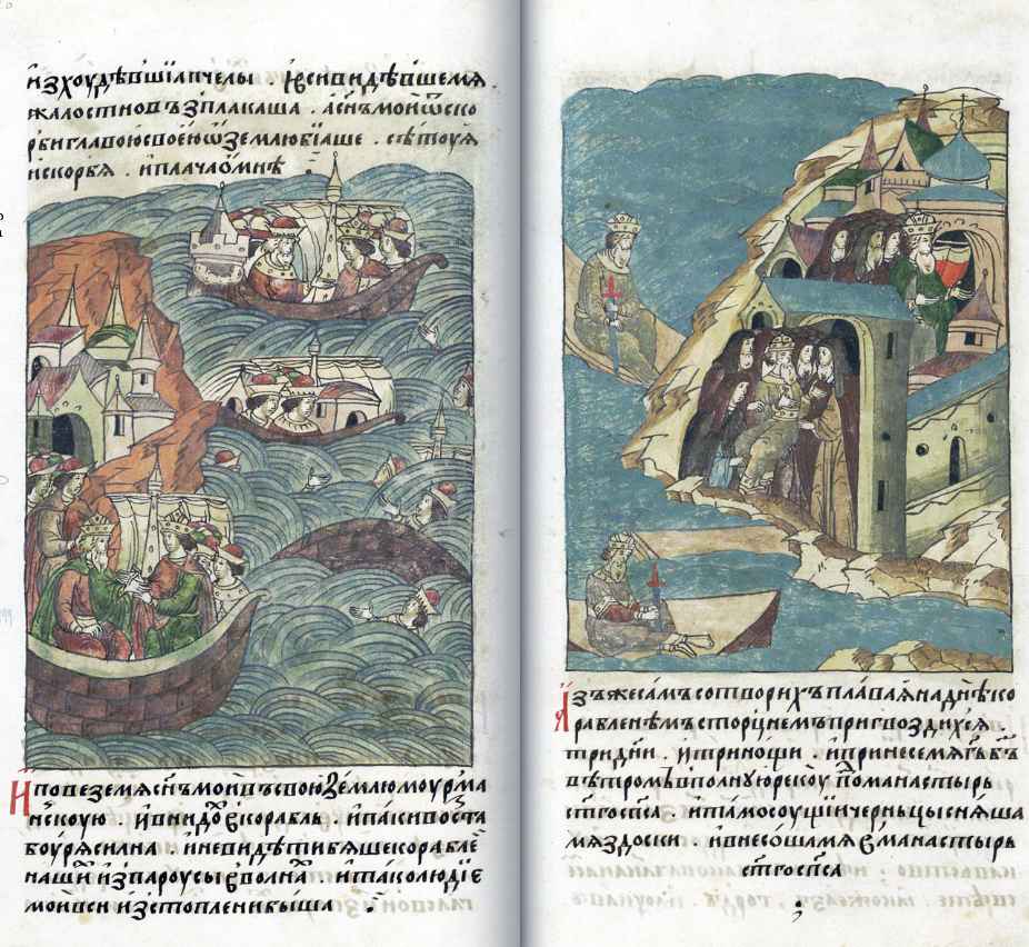 ЛИЦЕВОЙ ЛЕТОПИСНЫЙ СВОД исхудавших пчел. И все, видевшие меня, жалостно заплакали, запричитали. А сын мой от скорби бился головой о землю, сетуя, скорбя и плача обо мне. И повез меня сын мой в свою Мурманскую землю. И, когда я поднялся на корабль, опять поднялась сильная буря, так что не видно стало кораблей наших с парусами в волнах. И так все люди мои были потоплены. Я же сам, привязав себя к доске корабельного днища, плавал три дня и три ночи. И принес меня Господь ветром в реку Полная, к монастырю святого Спаса. И бывшие там чернецы сняли меня с доски и внесли в монастырь святого Спаса.